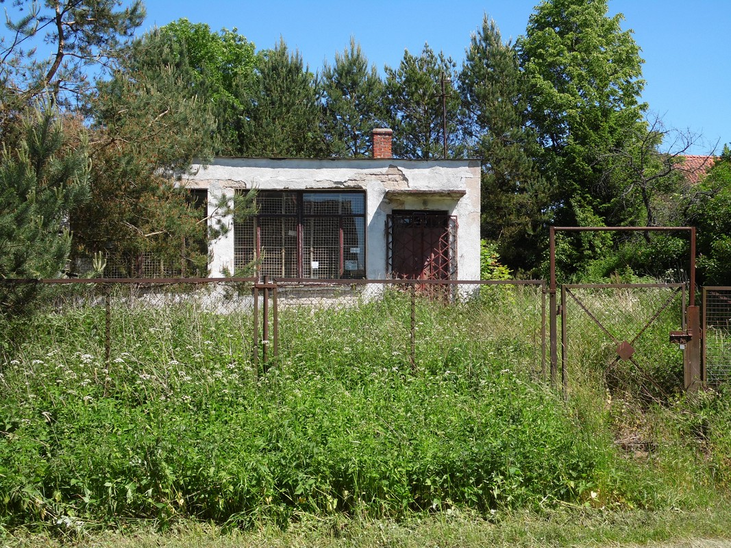 Zdewastowany budynek Sklepu wiejskiego.